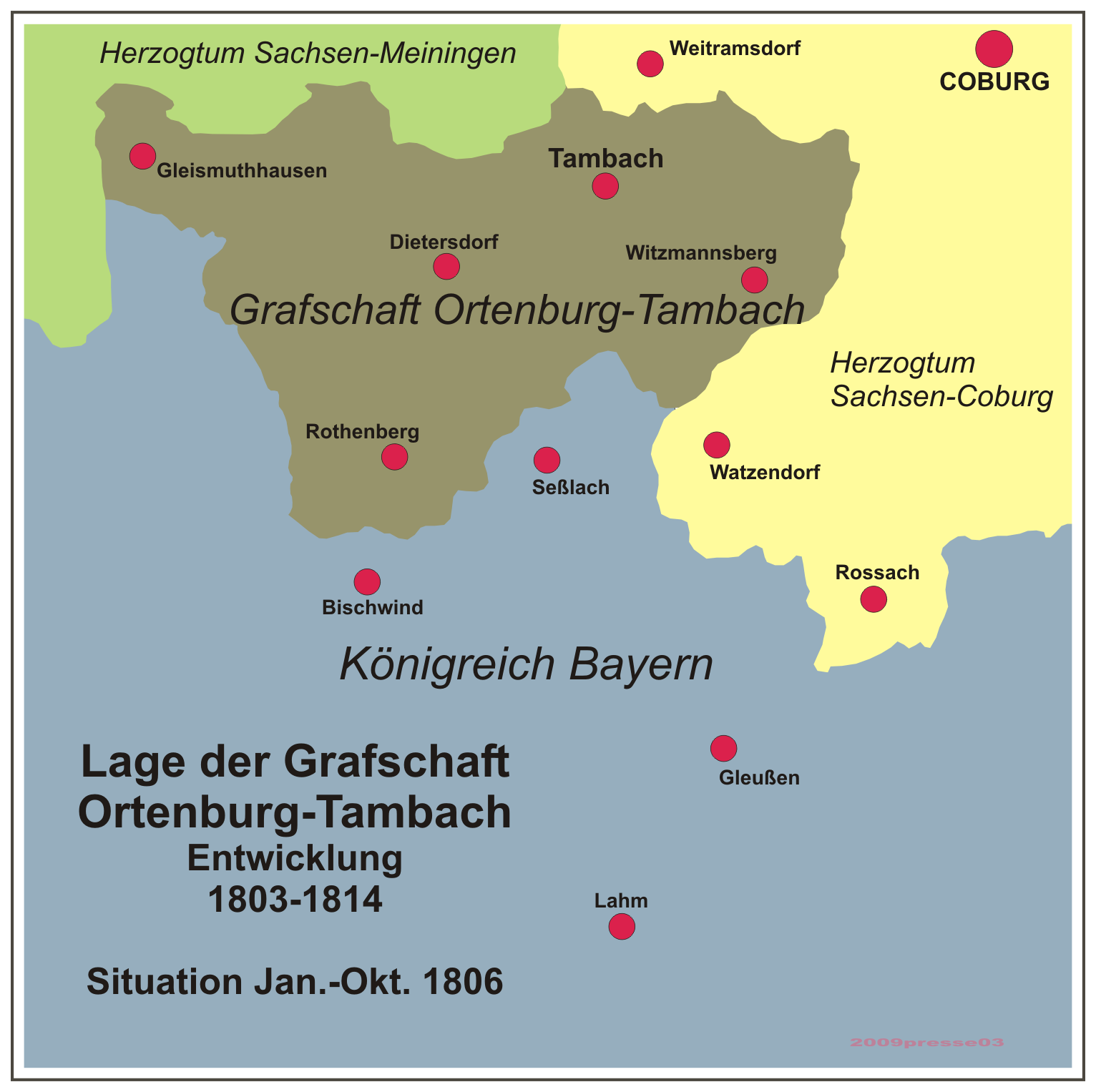 Gebiet um Tambach Januar-Oktber 1806